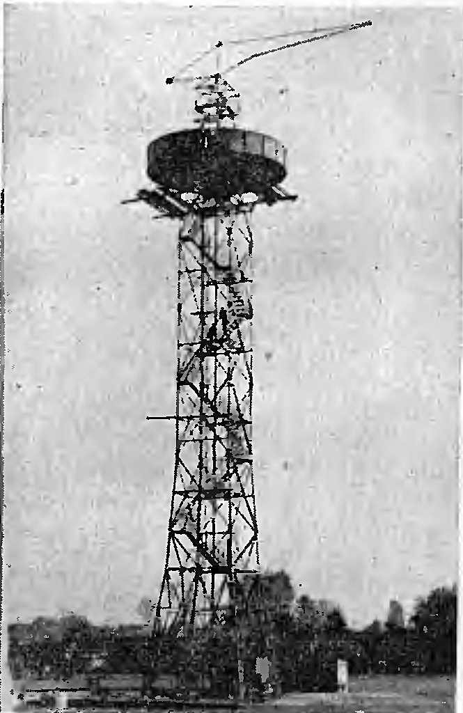 Wieża spadochronowa przy Drodze Dębińskiej, Poznań